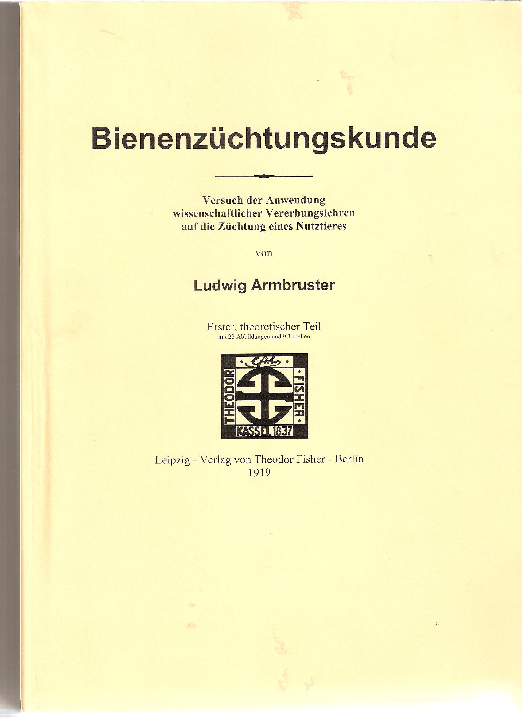 Ludwig Armbruster, Bienenzüchtungskunde, Theodor Fischer Berlin 1919, Nachdruck Ertl & Ertl Wien 2003.